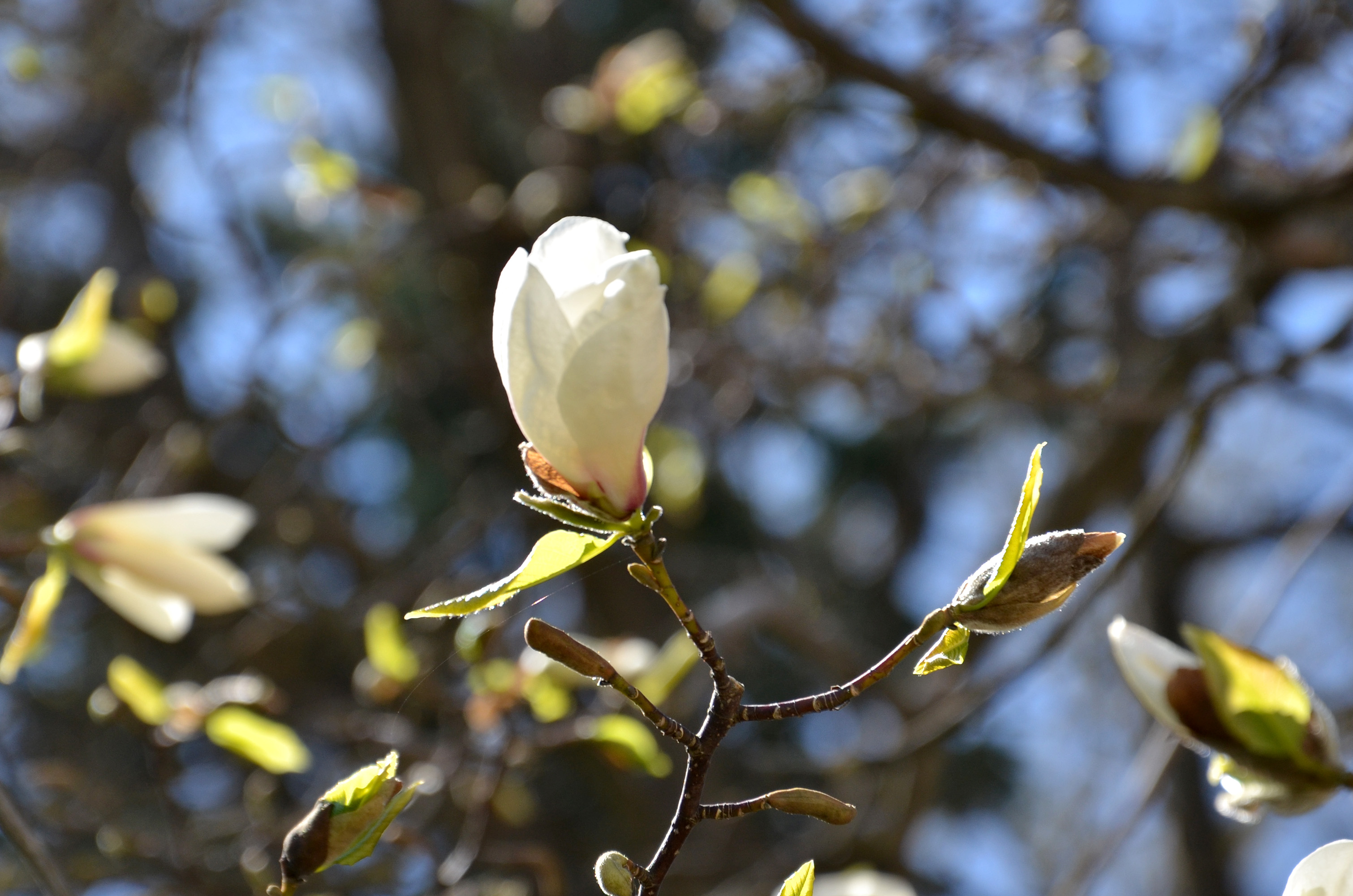 Весняний цвіт «Тернопільських магнолій».